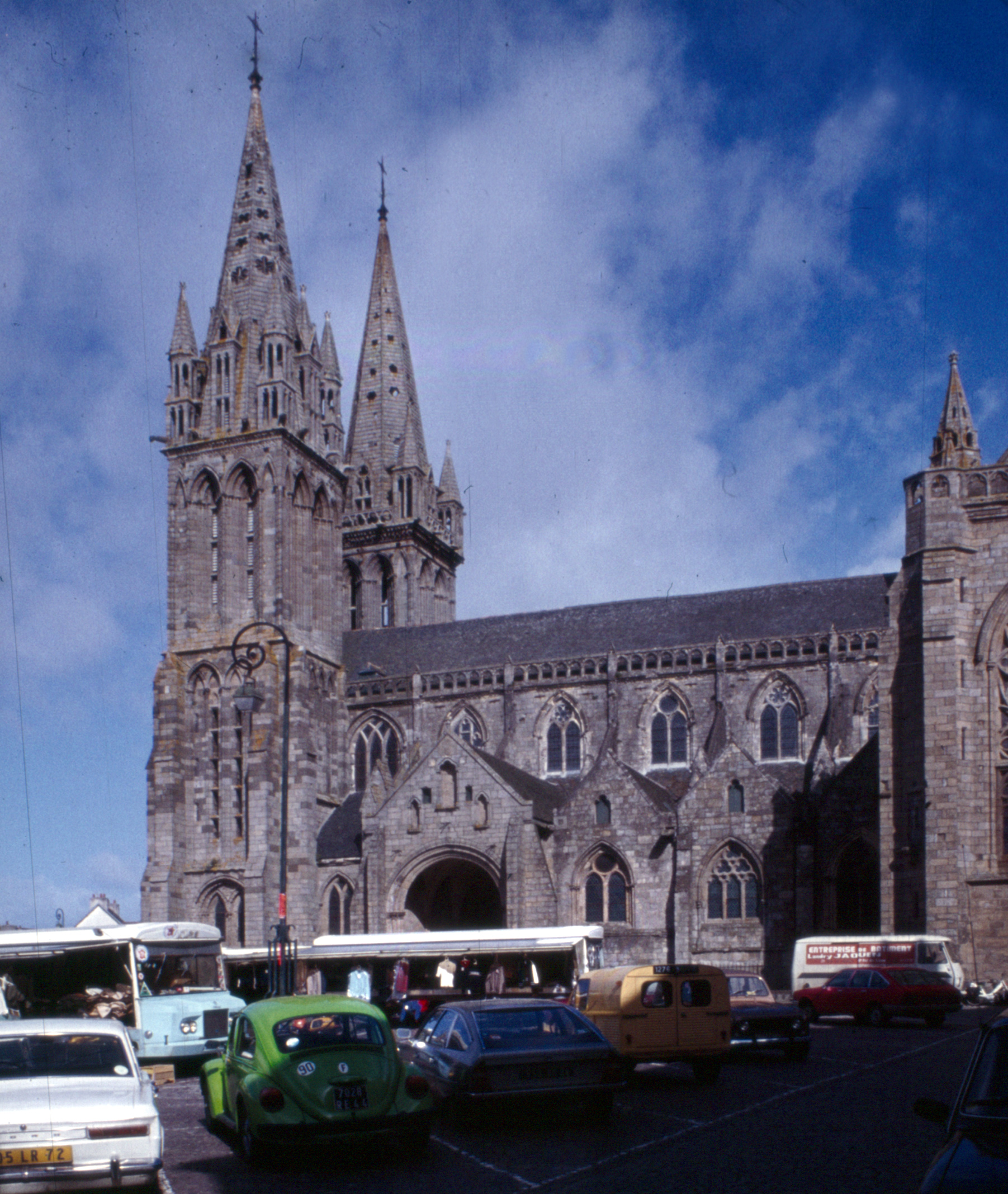 Saint-Pol-de-Léon